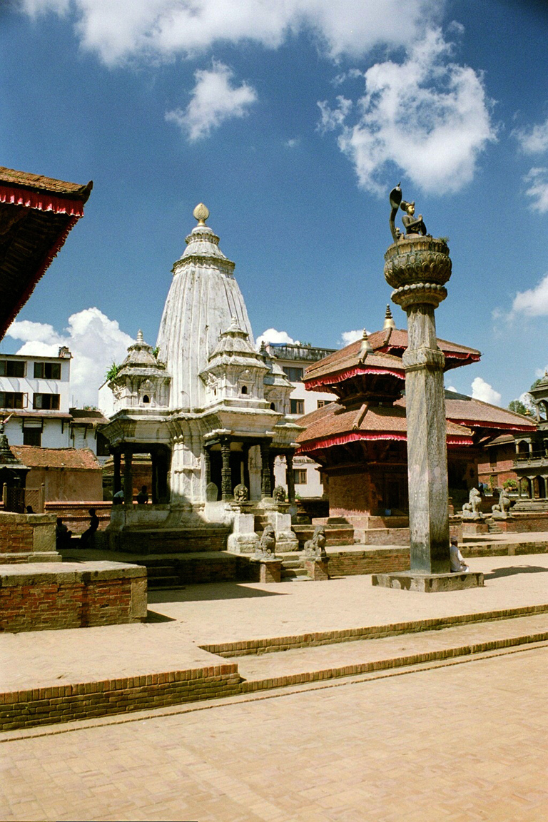 Durbar Square Patan